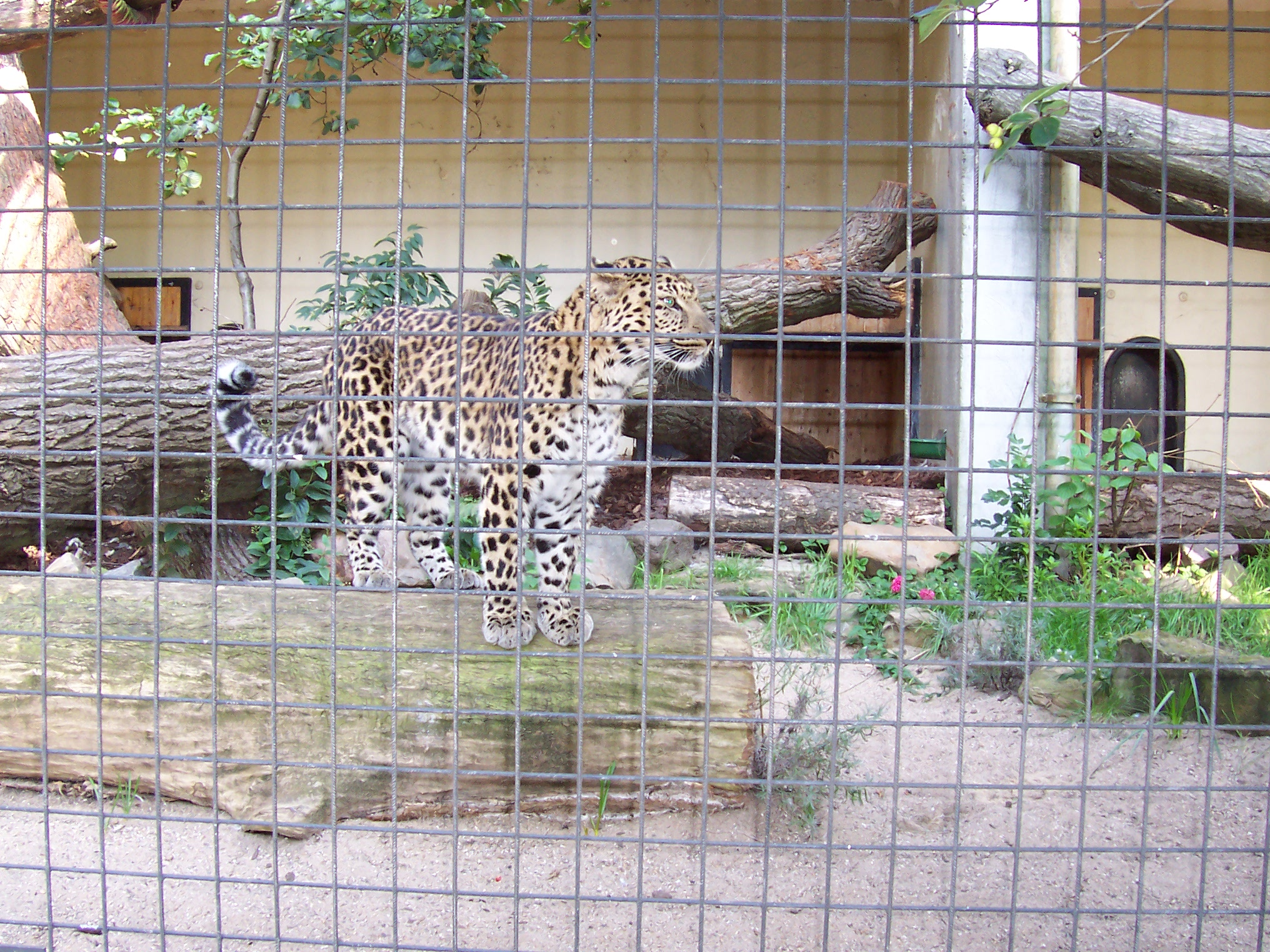 Amur leopard (Panthera pardus orientalis) in Artis Zoo, Amsterdam